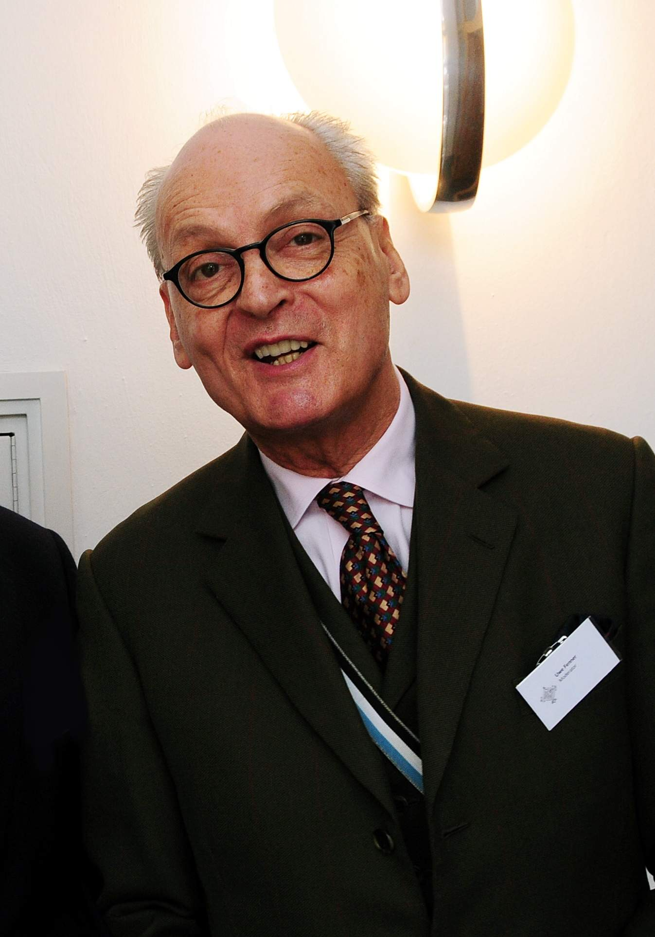 Fotografie von Uwe Fenner